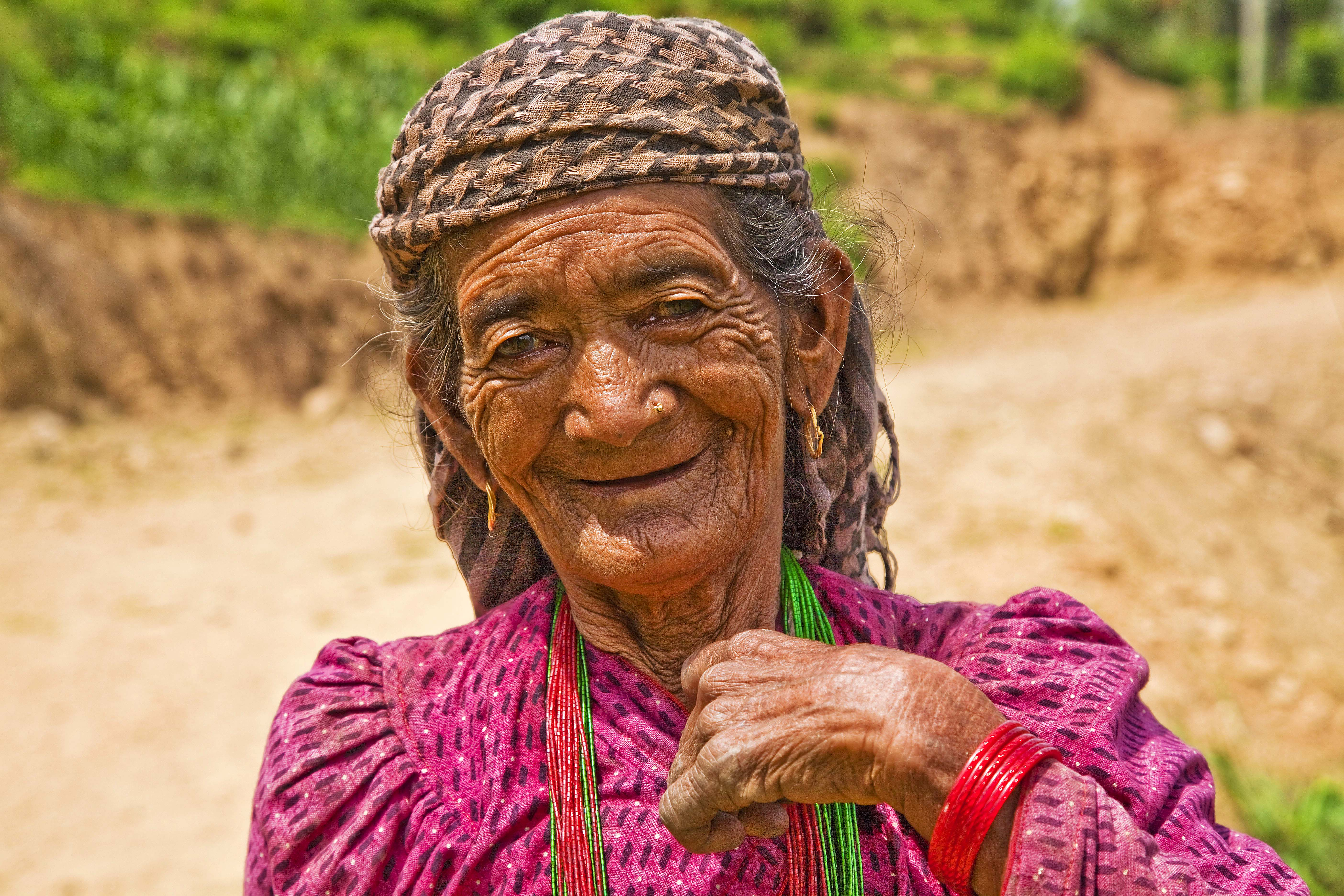 Alte Dame in Nepal